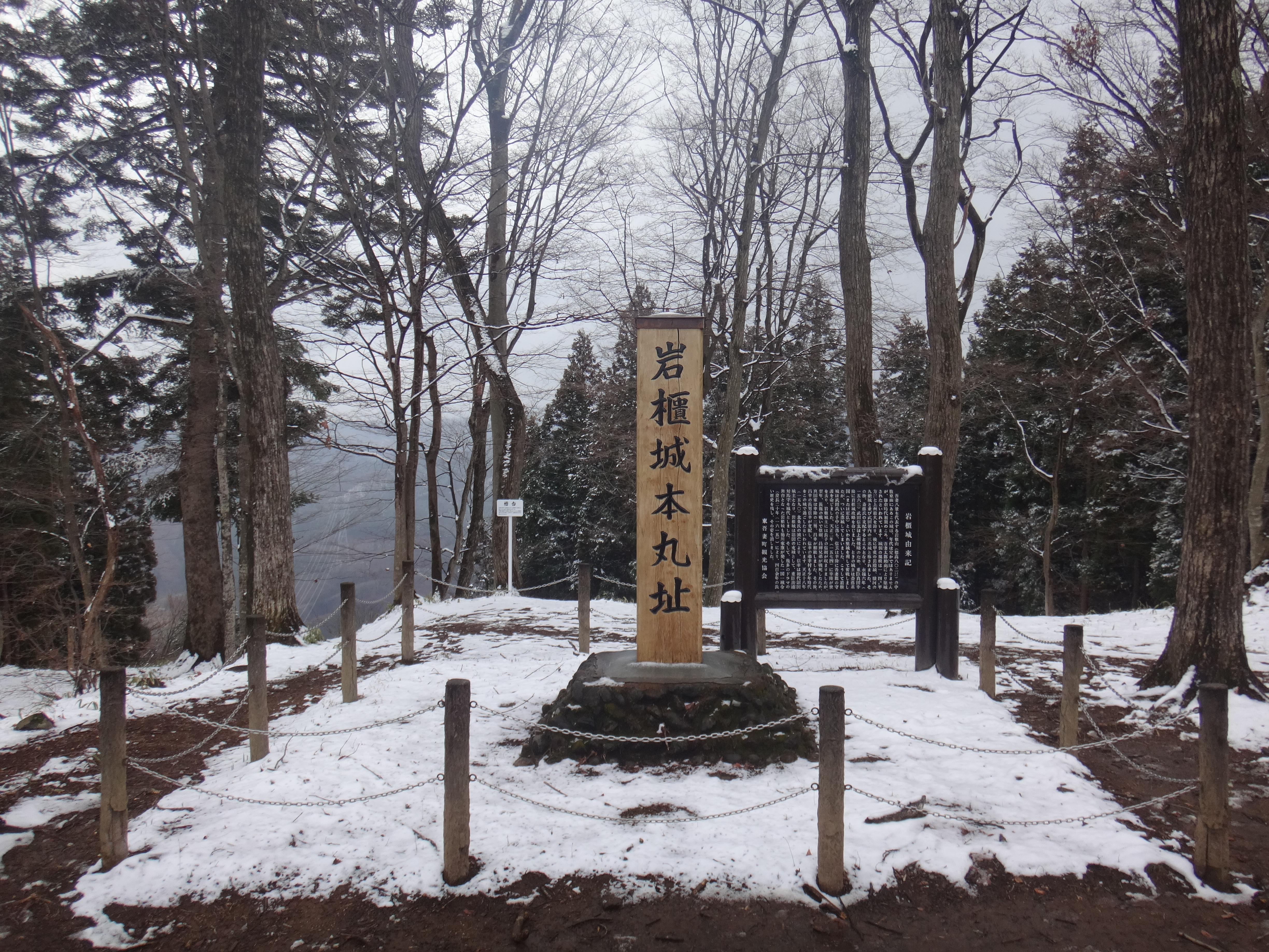 登山道途中の岩櫃城址